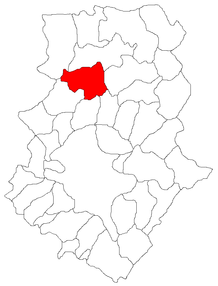 Categorie:Hărţi ale judeţului Ilfov